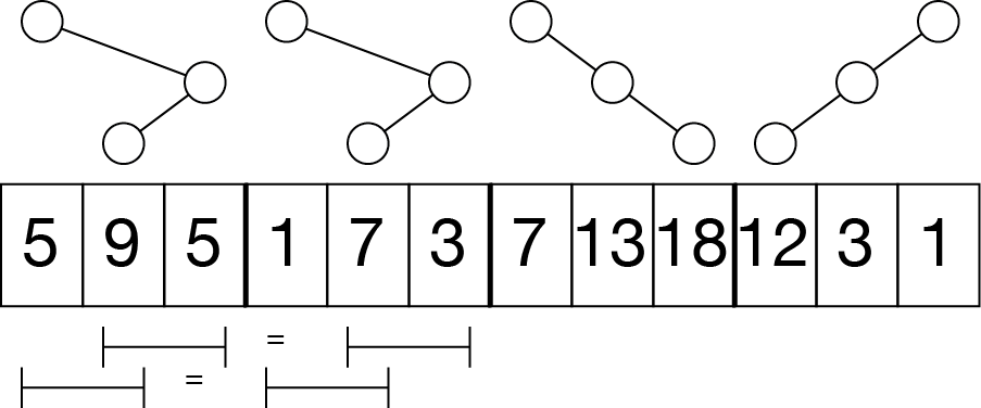 Beispiel für Karteische Bäume